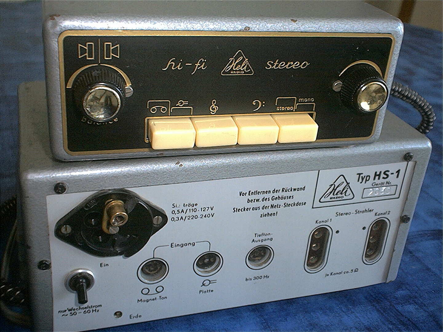 Heli Stereoverstärker HS1